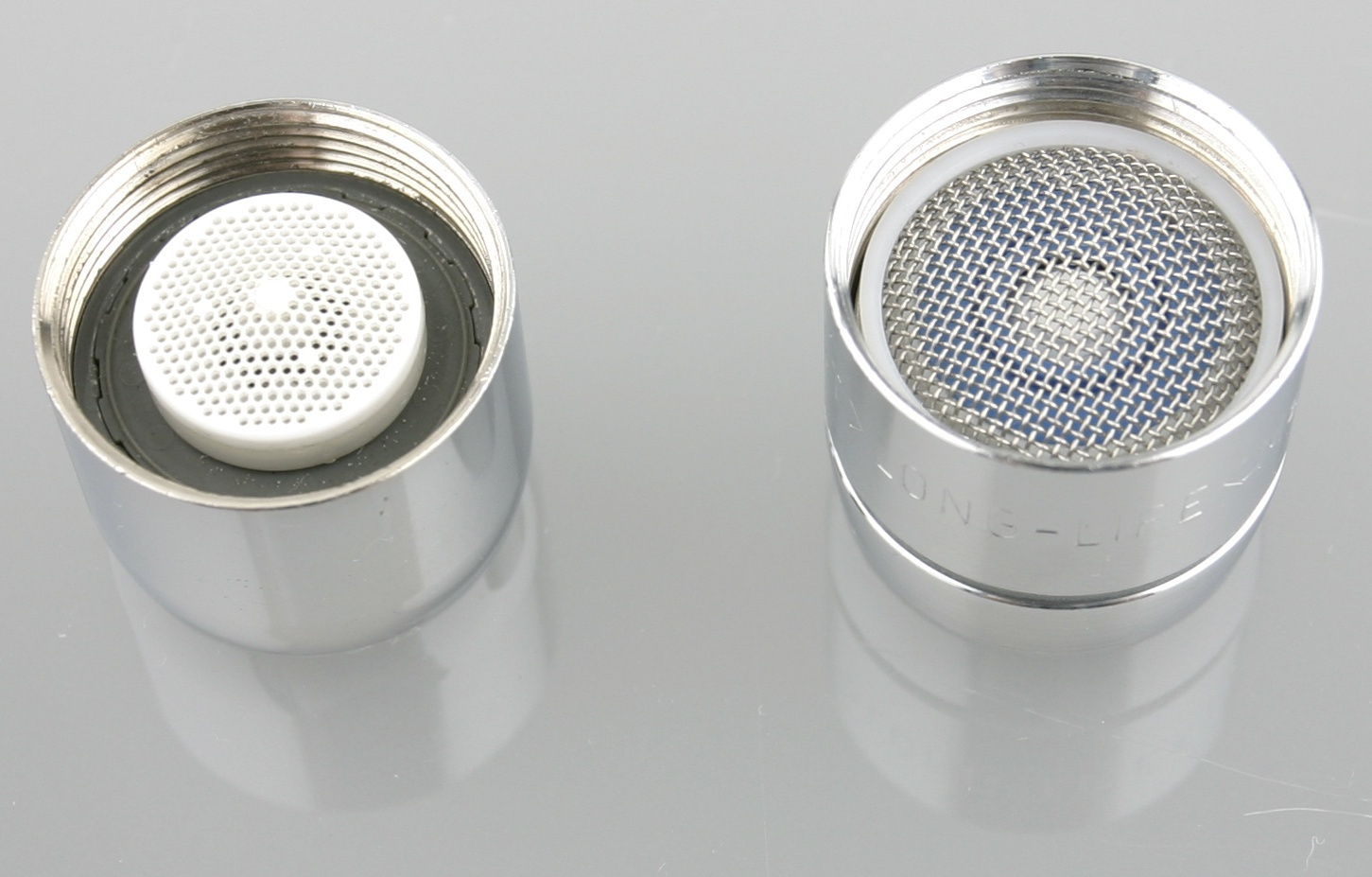 Strahlregler mit Mengenregler - Außen